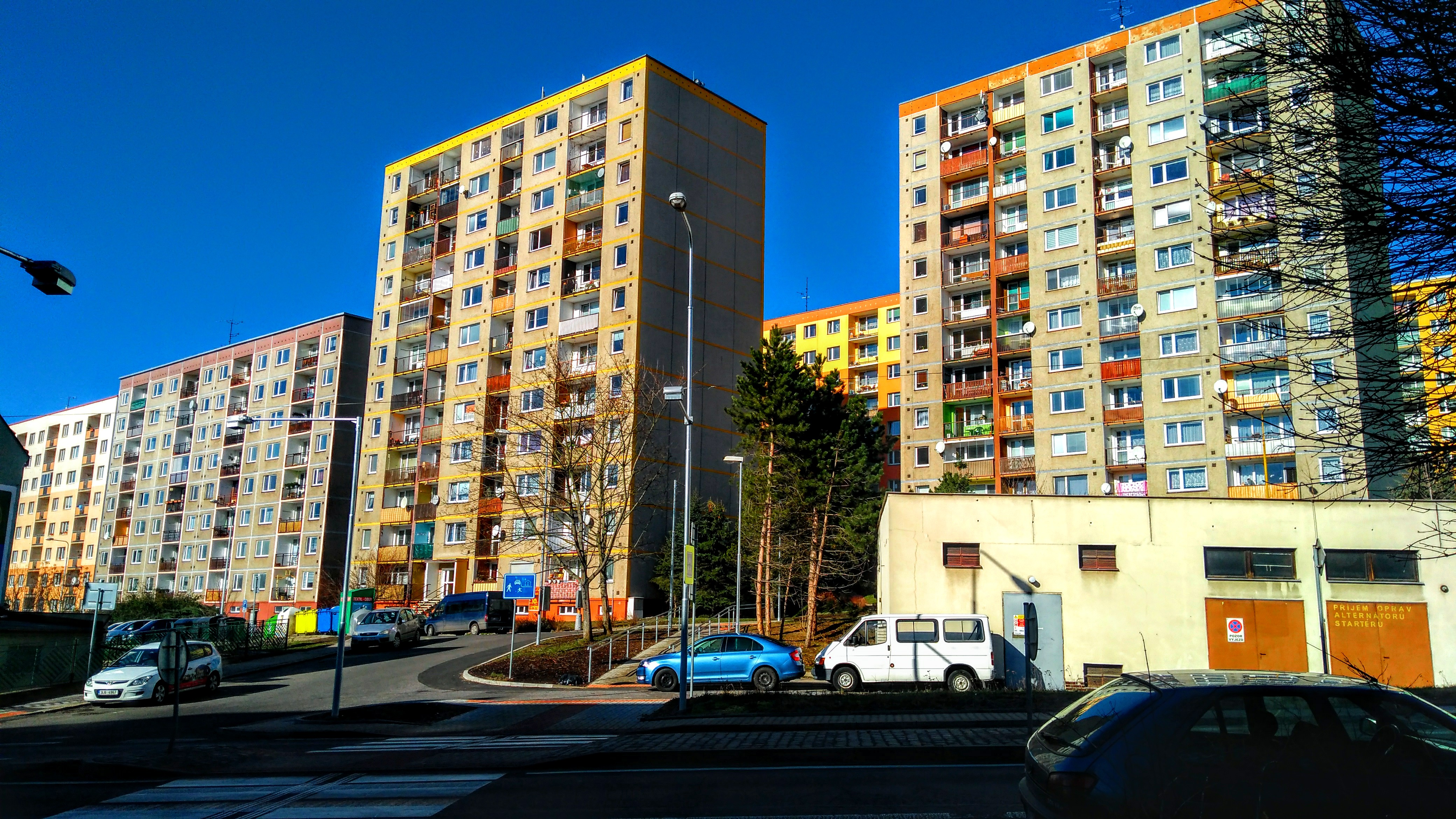 Sídliště.